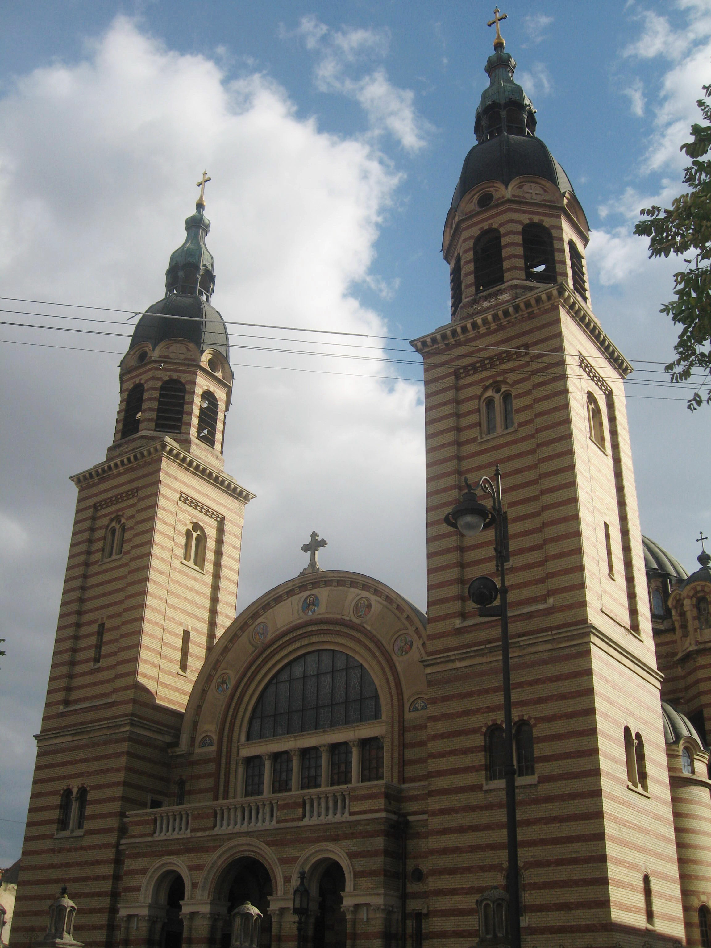 Catedrala mitropolitana din Sibiu